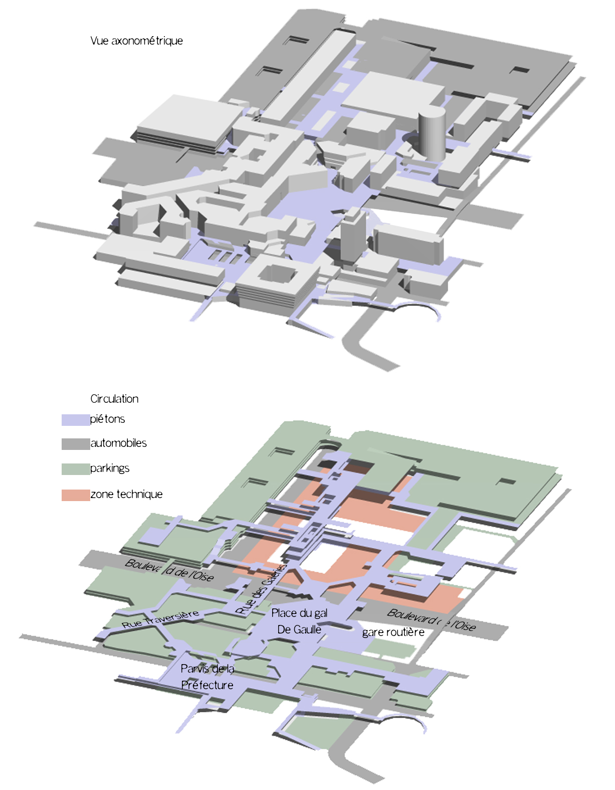 axonométries de la dalle de Cergy-Préfecture